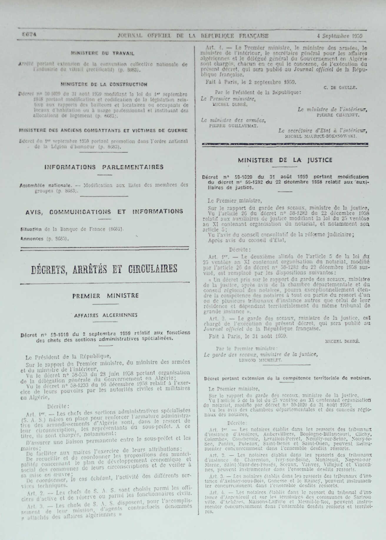 Fac-similé: Décret n°59-1019 du 2 septembre 1959, J.O. du 4 septembre 1959.